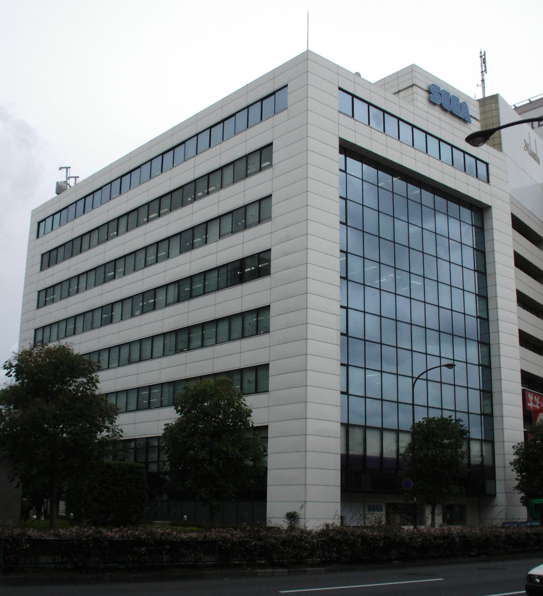 株式会社セガ 本社2号館 東京都大田区羽田一丁目2番12号